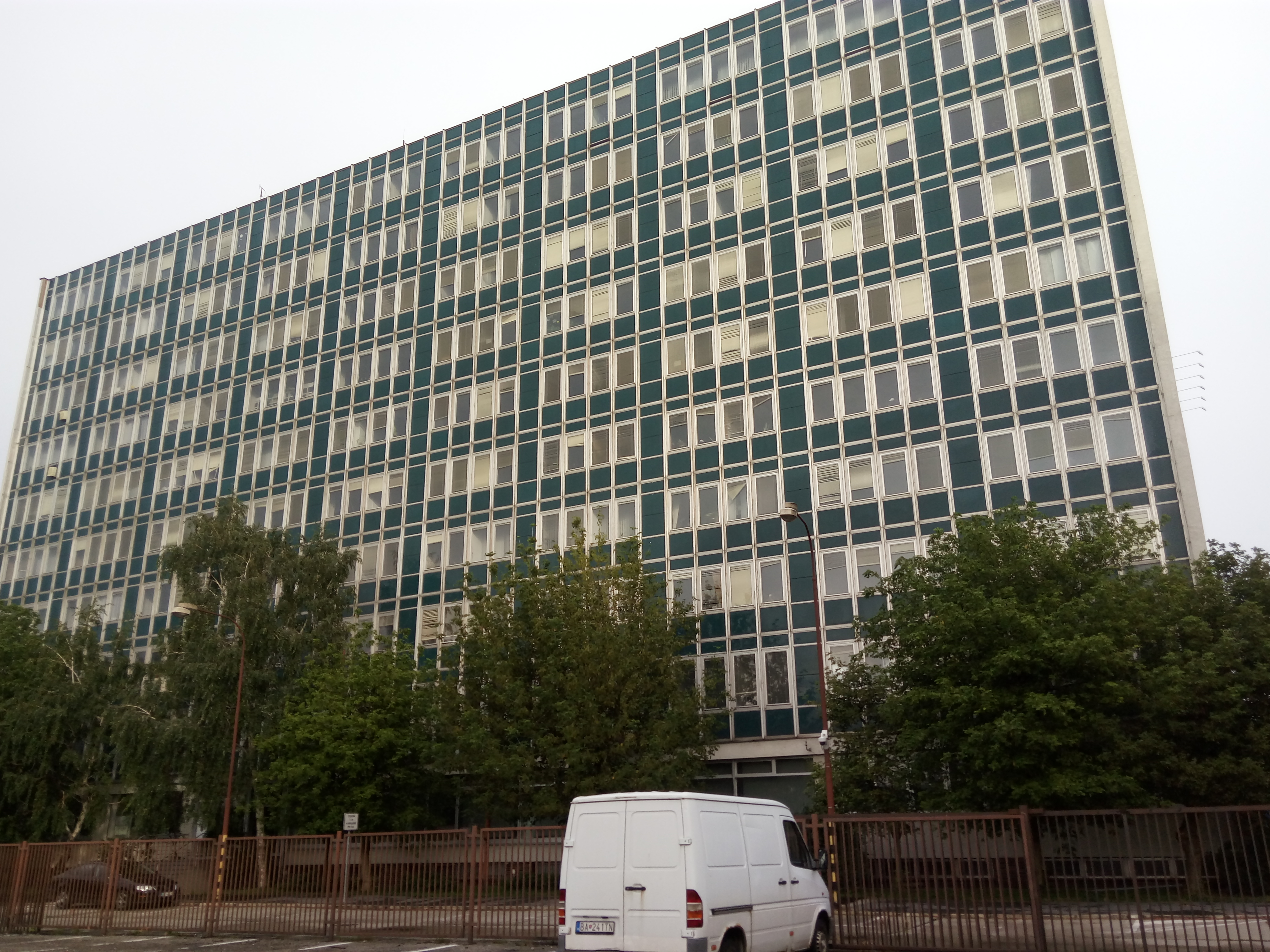 Miletičova 19, Ružinov, Bratislava